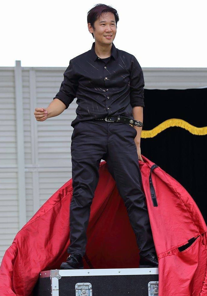 マジシャン・TAKE